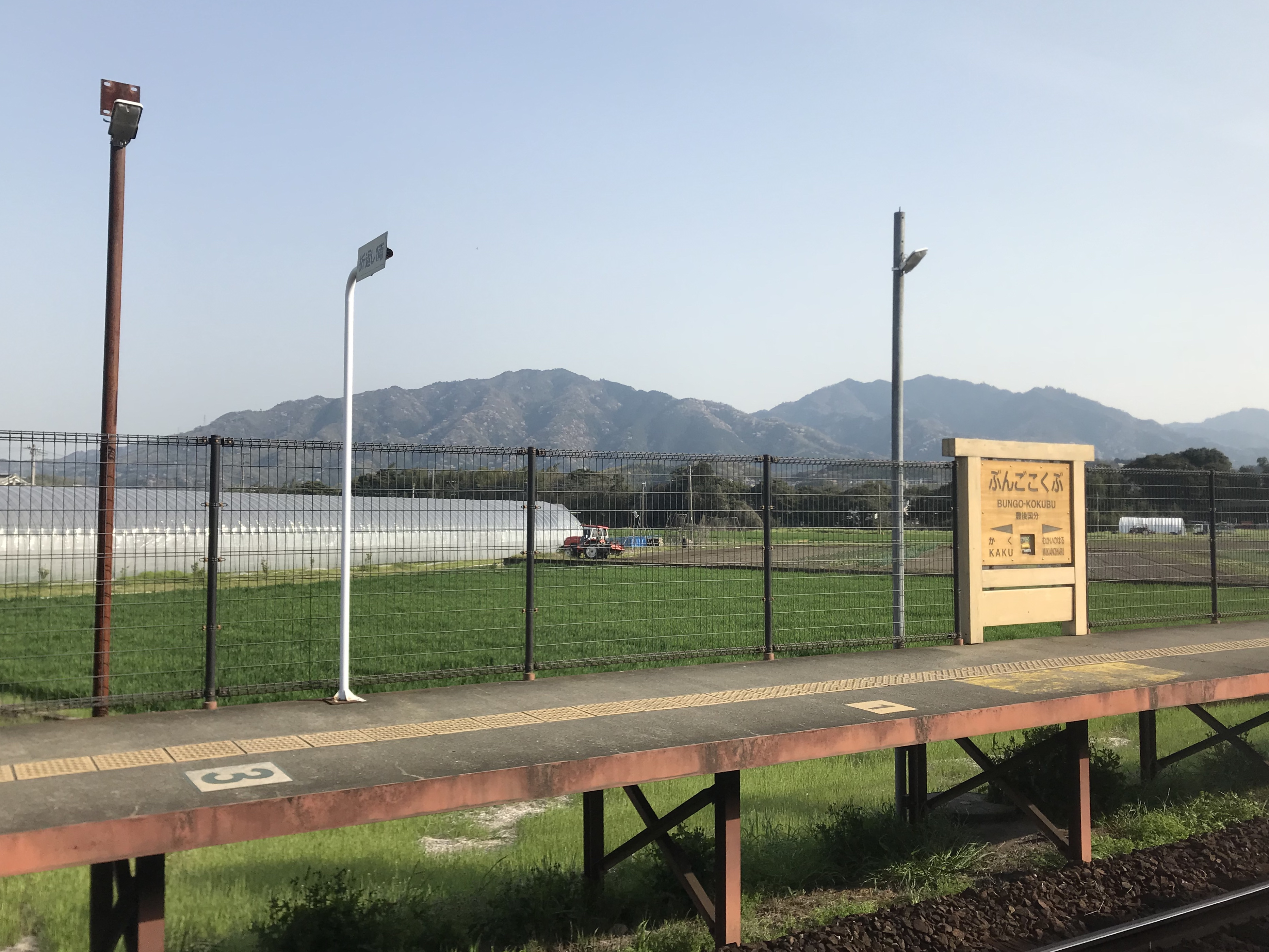 豊後国分駅に停車中の列車内より望む霊山(左側)と障子岳(右側)